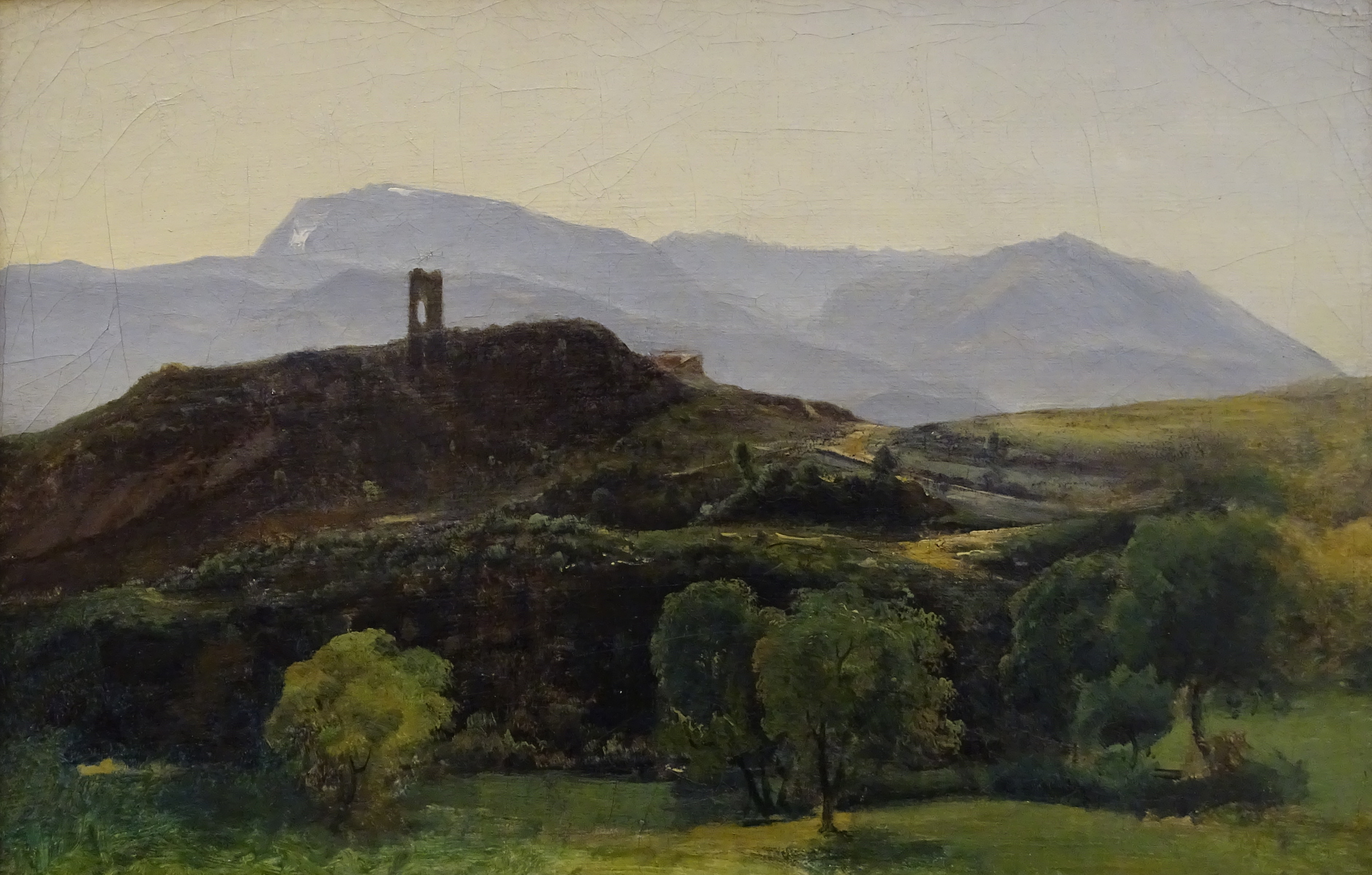 preliminary work